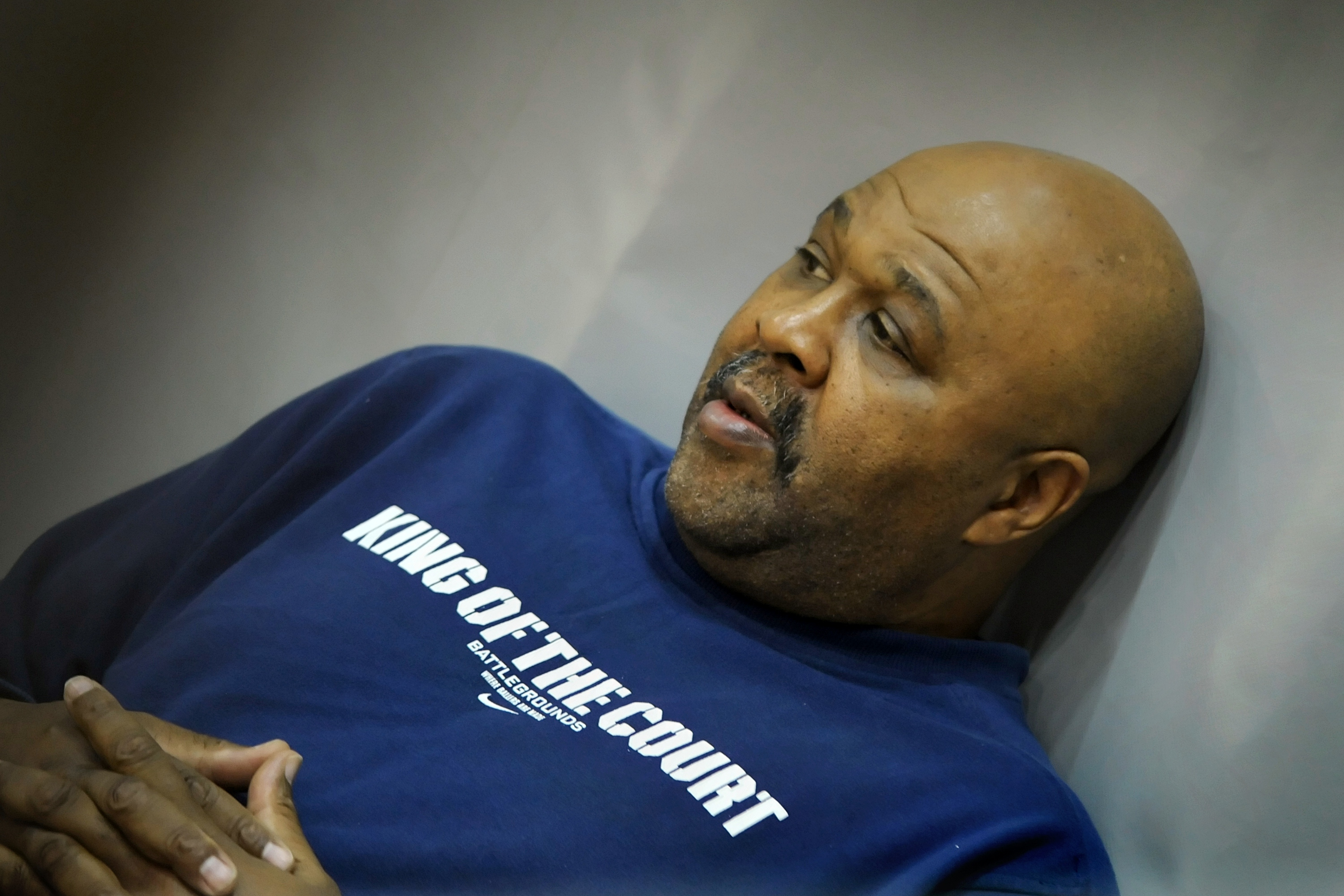 Larry Pounds 57-vuotiaana Pelikarhut-Catz ottelun katsomossa. Ottelussa pelasi hänen tyttärensä Anissa.